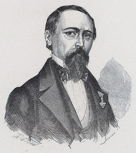 Ritratto di Casimiro Ara